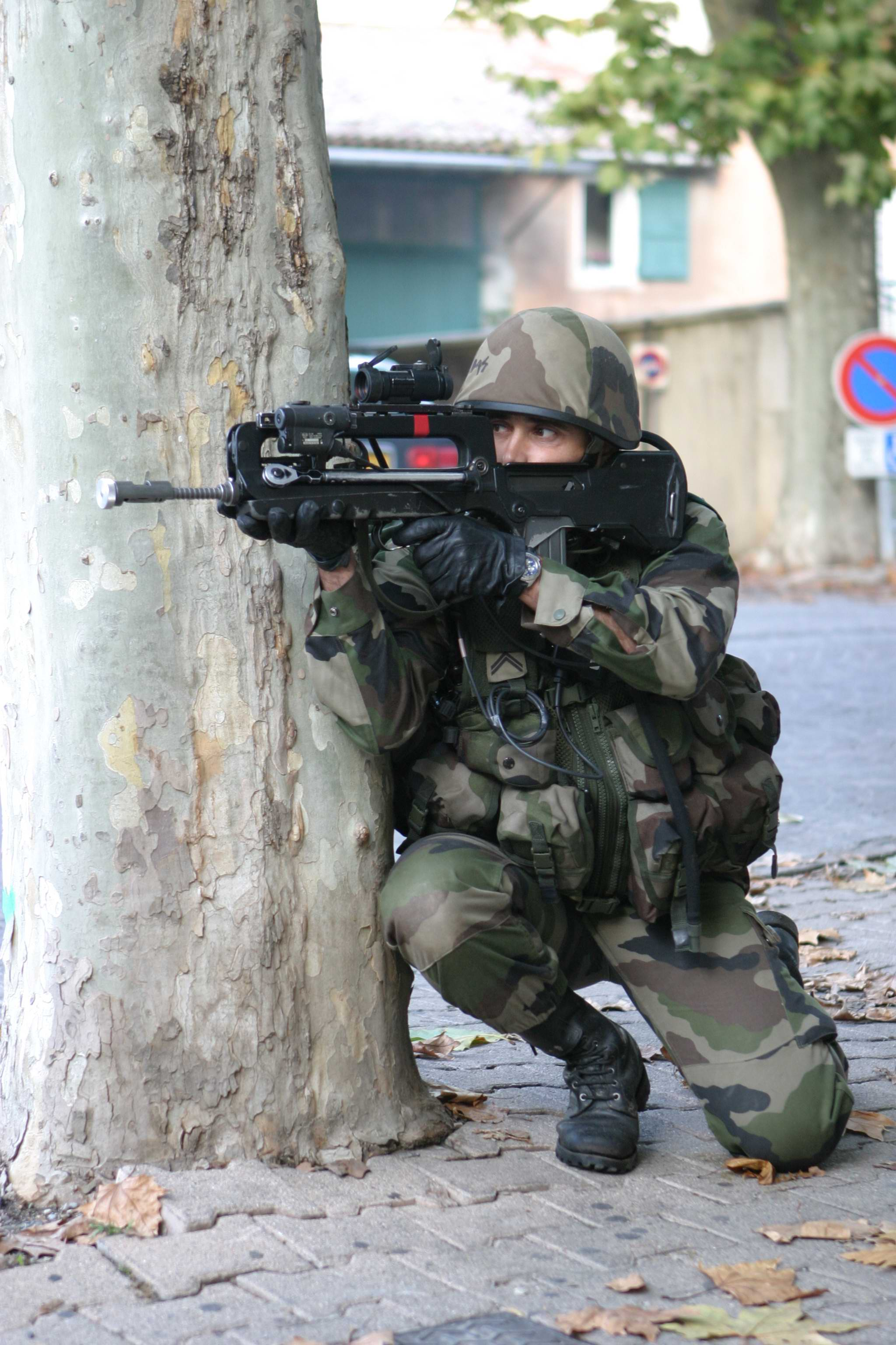 légionnaire du 2e régiment étranger d'infanterie en combat ZURB (zone urbaine) en France en 2004